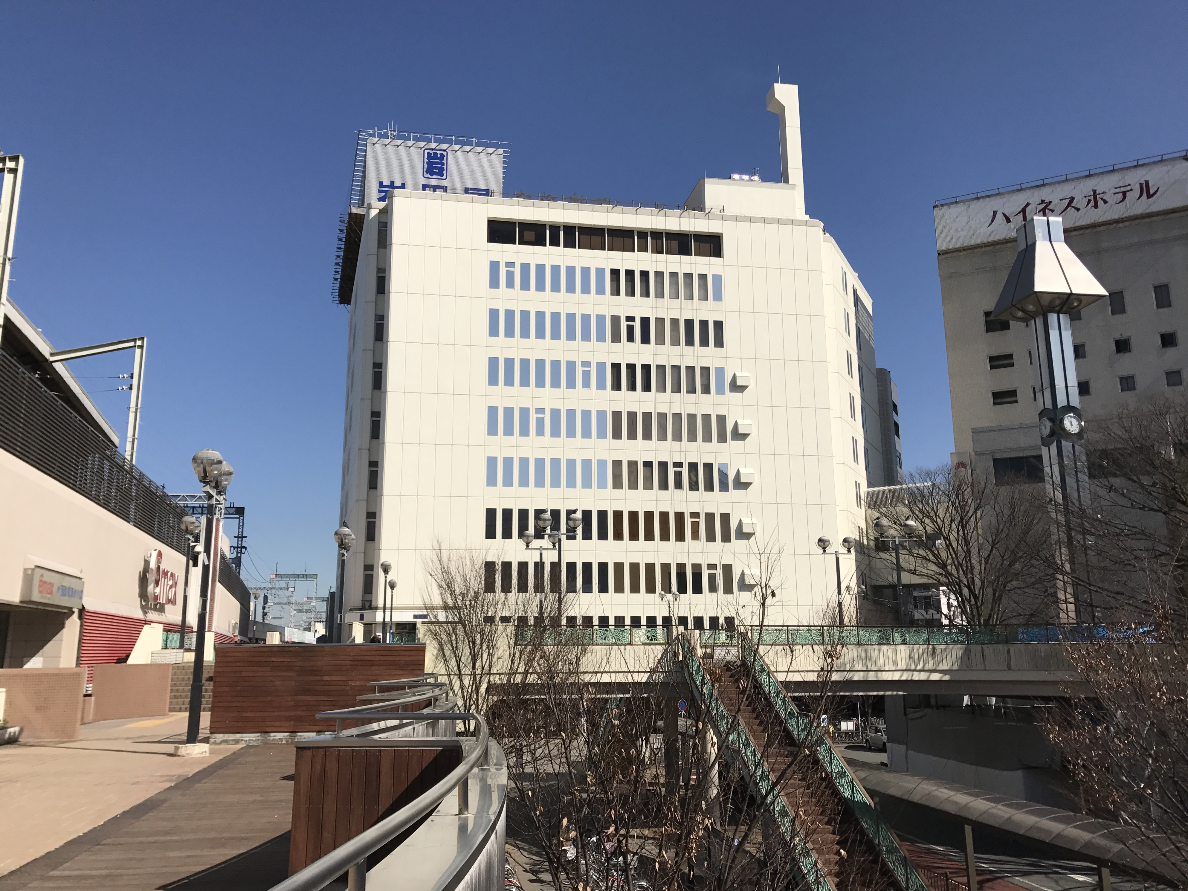 西鉄久留米駅東口前の岩田屋久留米店